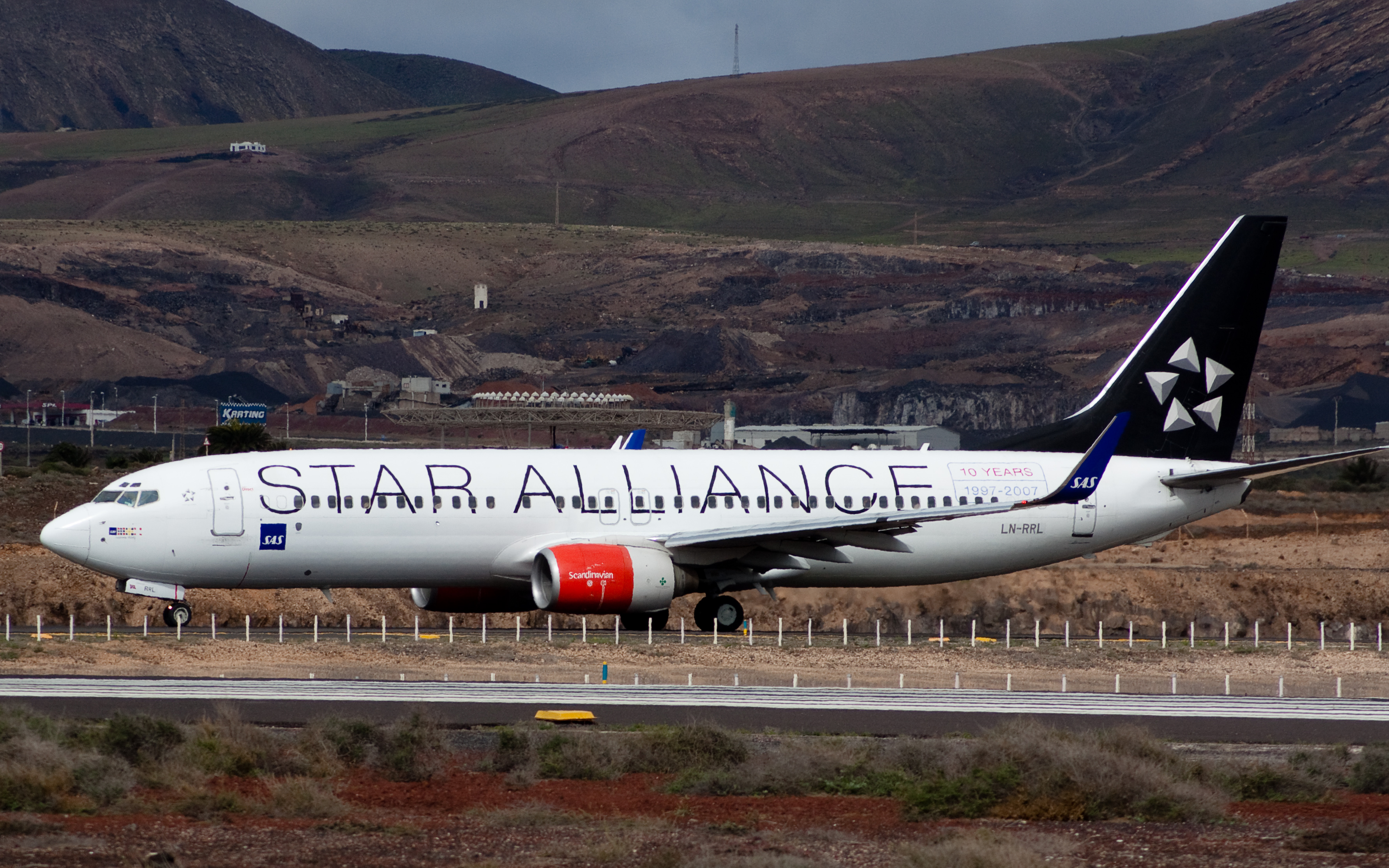 SAS B737-800 LN-RRL